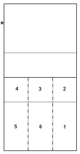 Les positions au volleyball